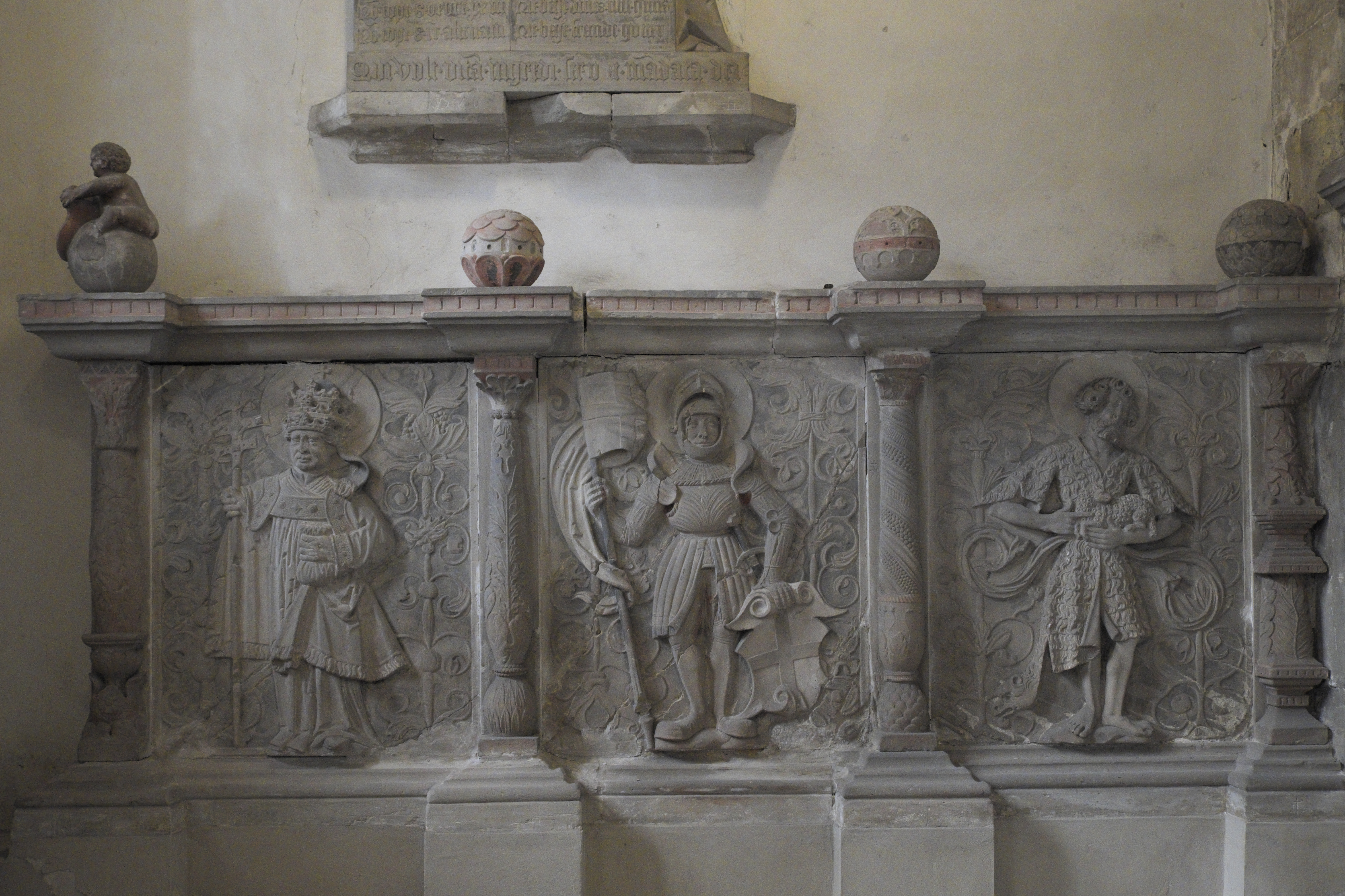 Dom St. Johannes und St. Laurentius in Merseburg im Saalekreis in Sachsen-Anhalt/Deutschland, ehemalige Schranken der Grabkapelle des Bischofs Sigismund von Lindenau im Langhaus, Reliefs der Südseite (Papst Sixtus, hl. Romanus, Johannes der Täufer)